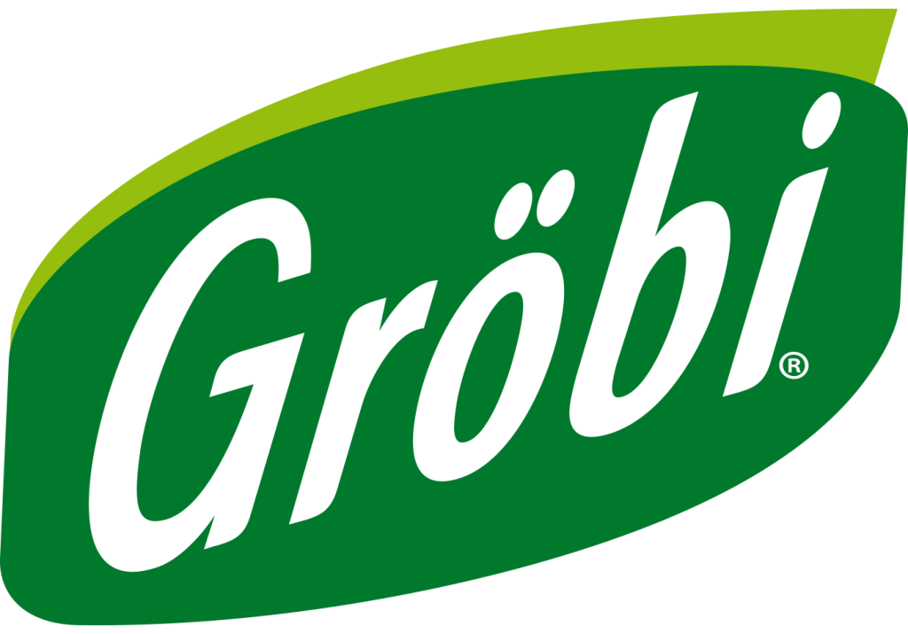 Logo